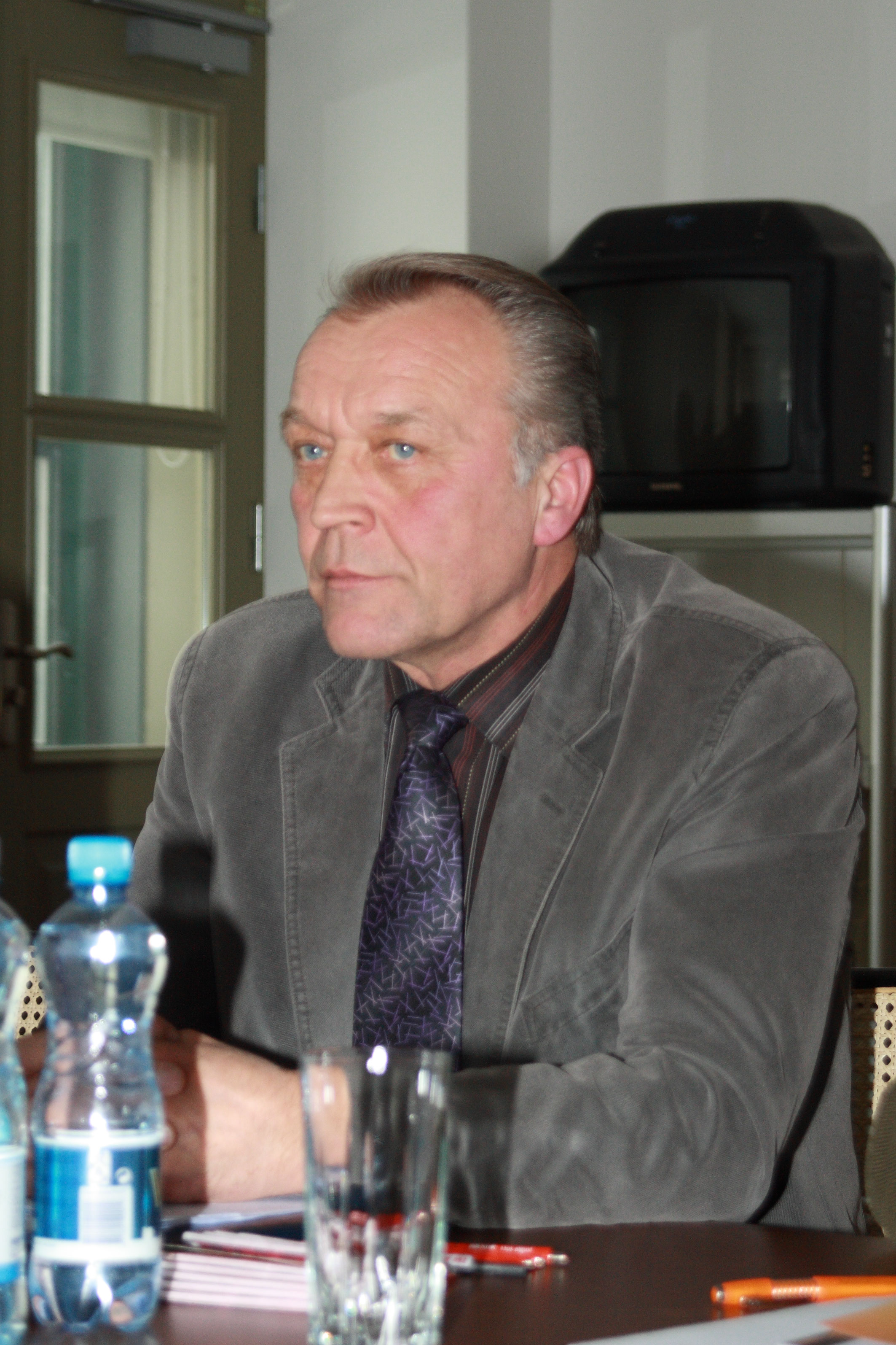 Raimu Aardam debatil "Kas 16-aastased noored peaksid saama valida või mitte?" Kuressaares